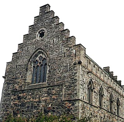 Et antatt bilde av Audun Hugleikssons borg, basert på Håkonshallen.